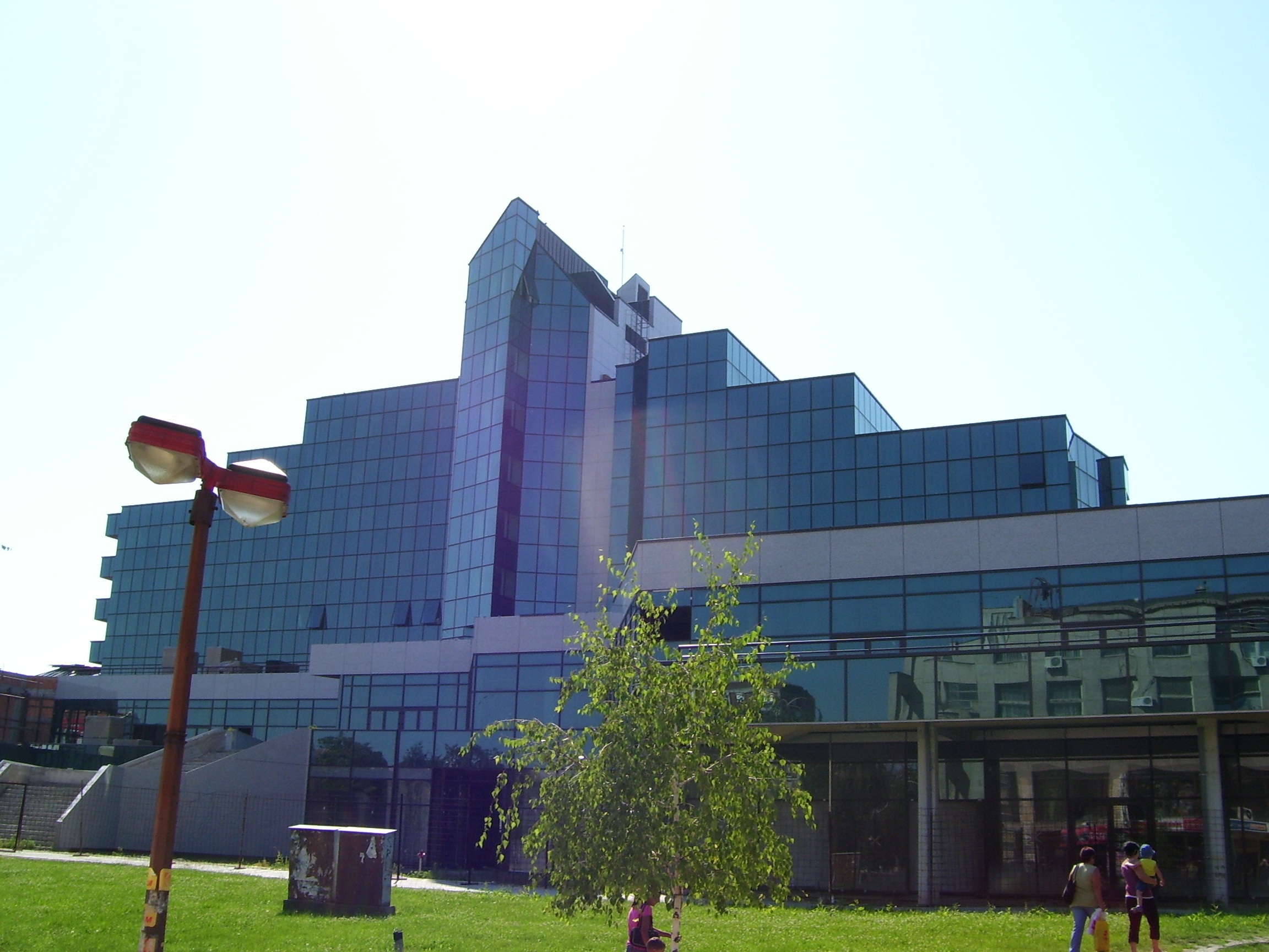 Хотел Слобода у Шапцу. Аутор фотографије је корисник: SRB Maric IT. Слика је урађена обичним фотоапаратом.